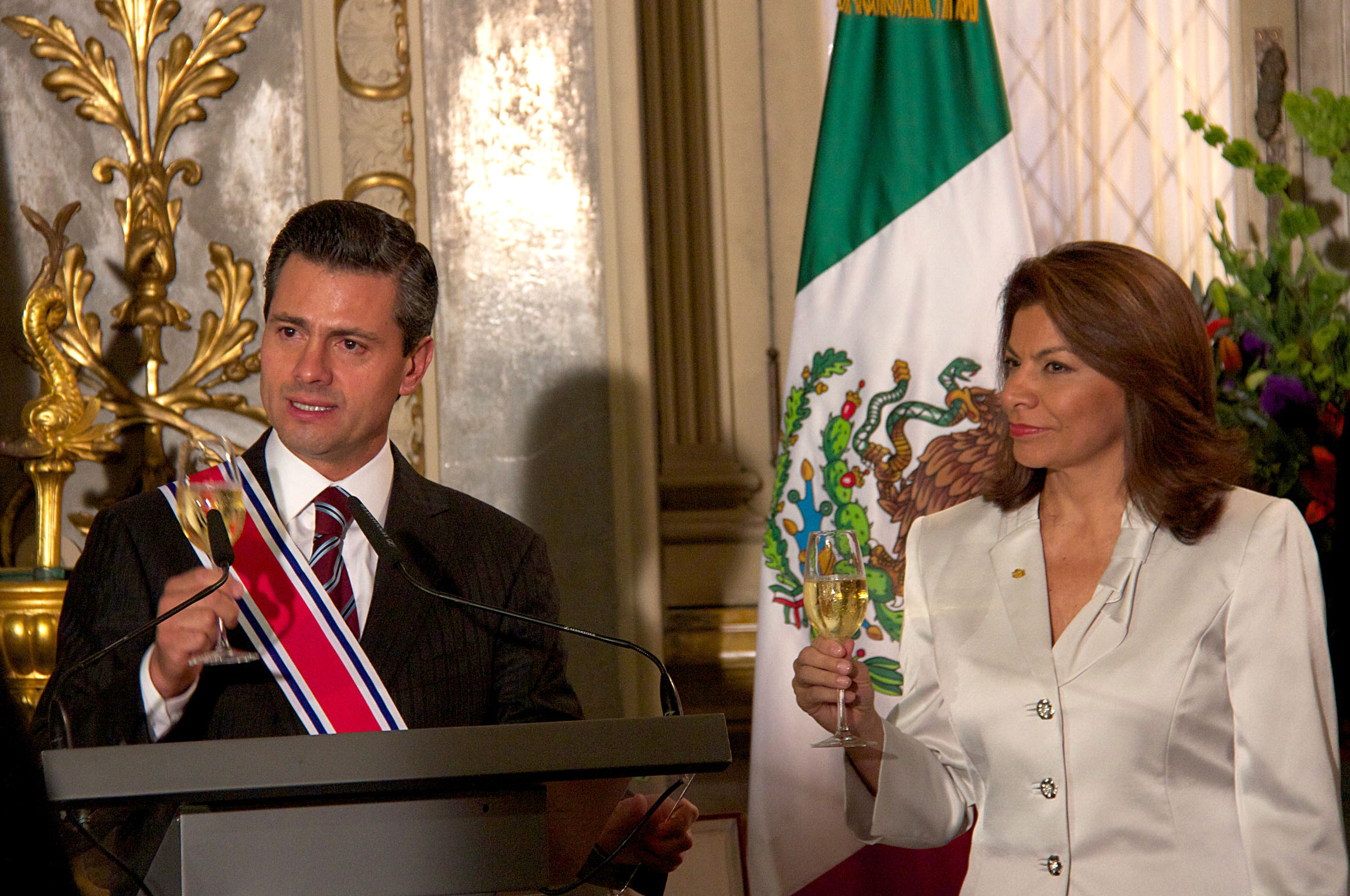 Gira por Costa Rica. San José, Costa Rica. 19 febrero 2013